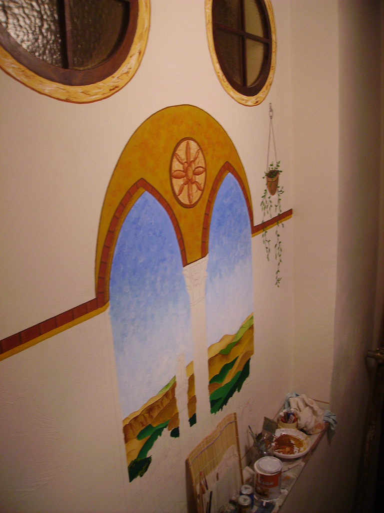 dipinto su intonaco, realizzato con colori acrilici.